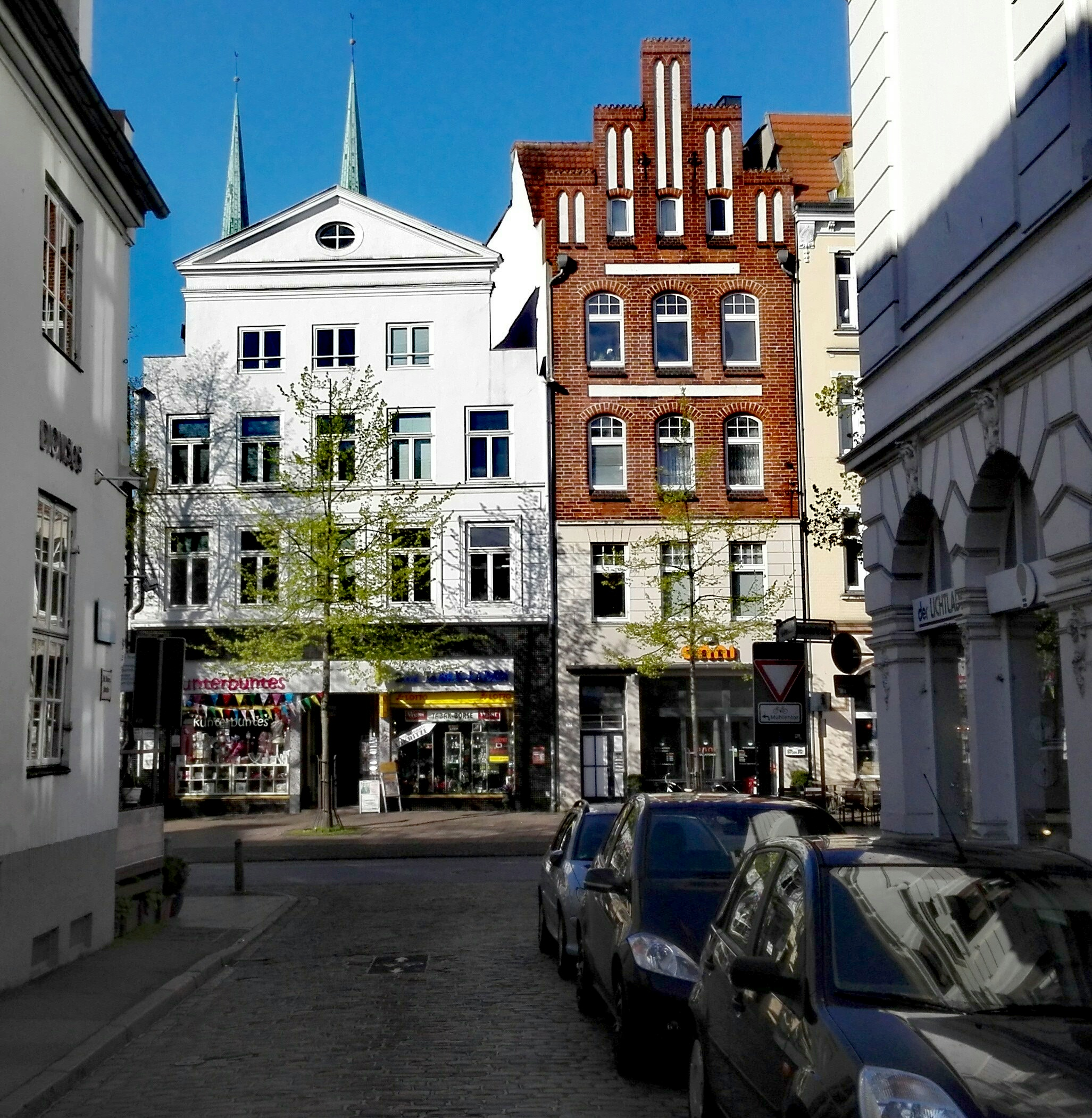 Aufsicht auf die Mühlenstraße aus der St.-Annen-Straße. Von hier kam 1907 Betty Schulz um Ernst Stiller auf der gegenüberliegenden Straßenseite zu erschießen.